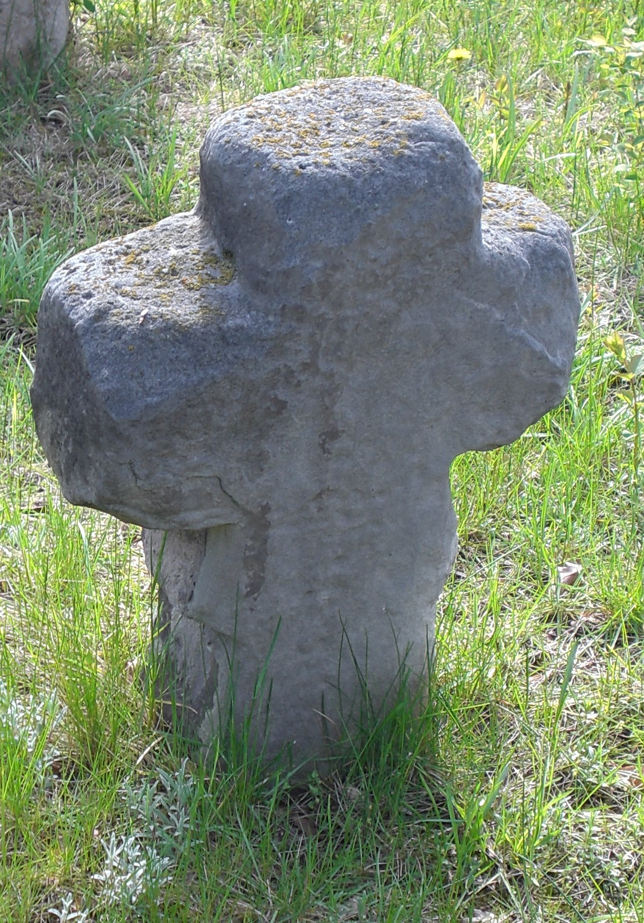 Sechs Steine Ilberstedt, vierter Stein